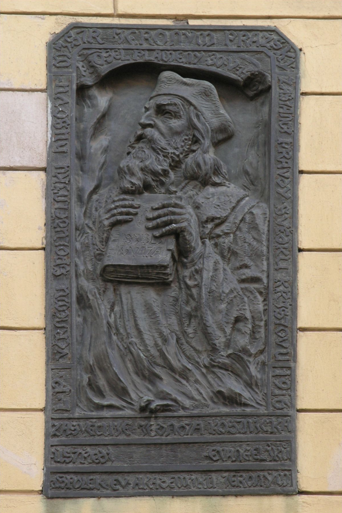 Praha, Nové Město - Řeznická ulice (pamětní deska Jeronýma Pražského)